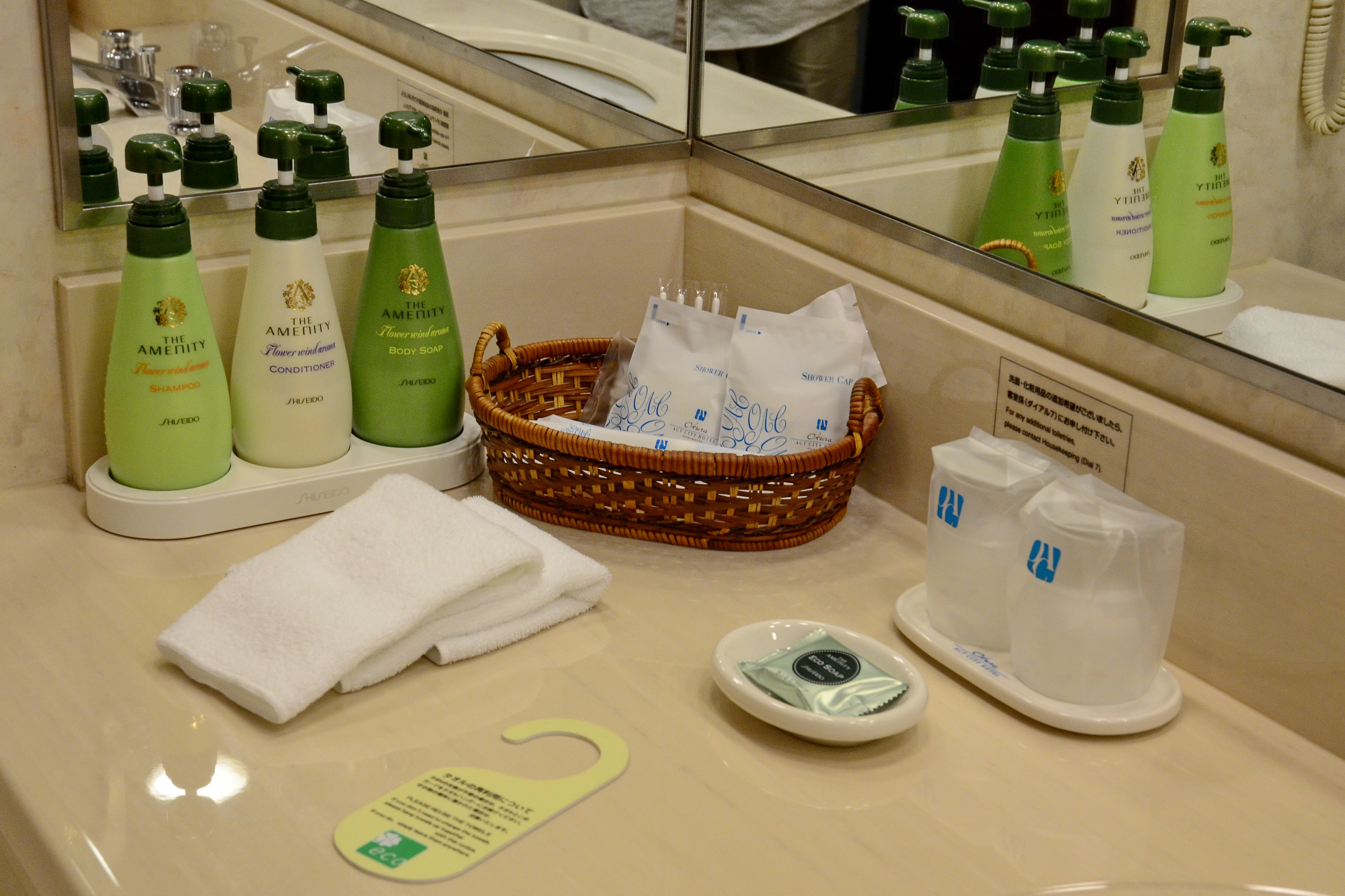 入住星级酒店，浴室名牌任用